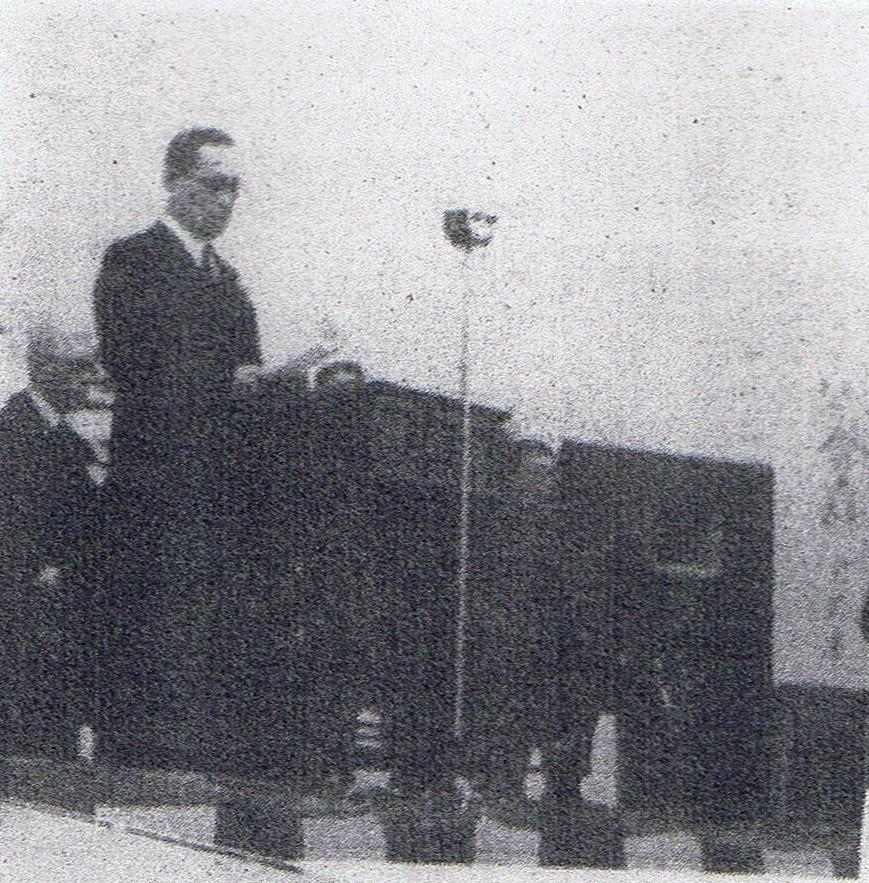 皇紀二千六百年奉祝全国基督教信徒大会司会者富田満牧師